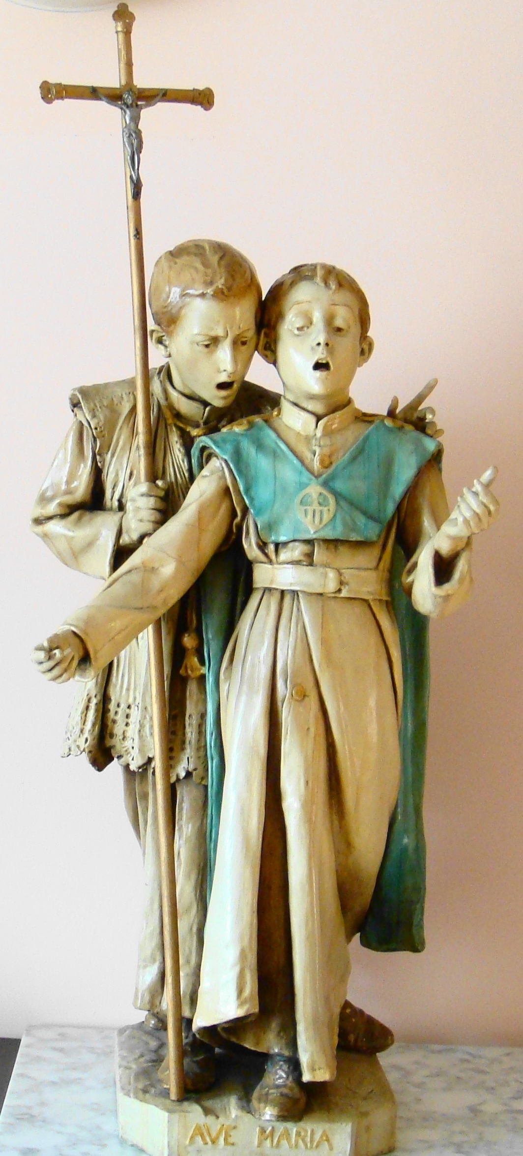 Escultura de Eusebi Arnau